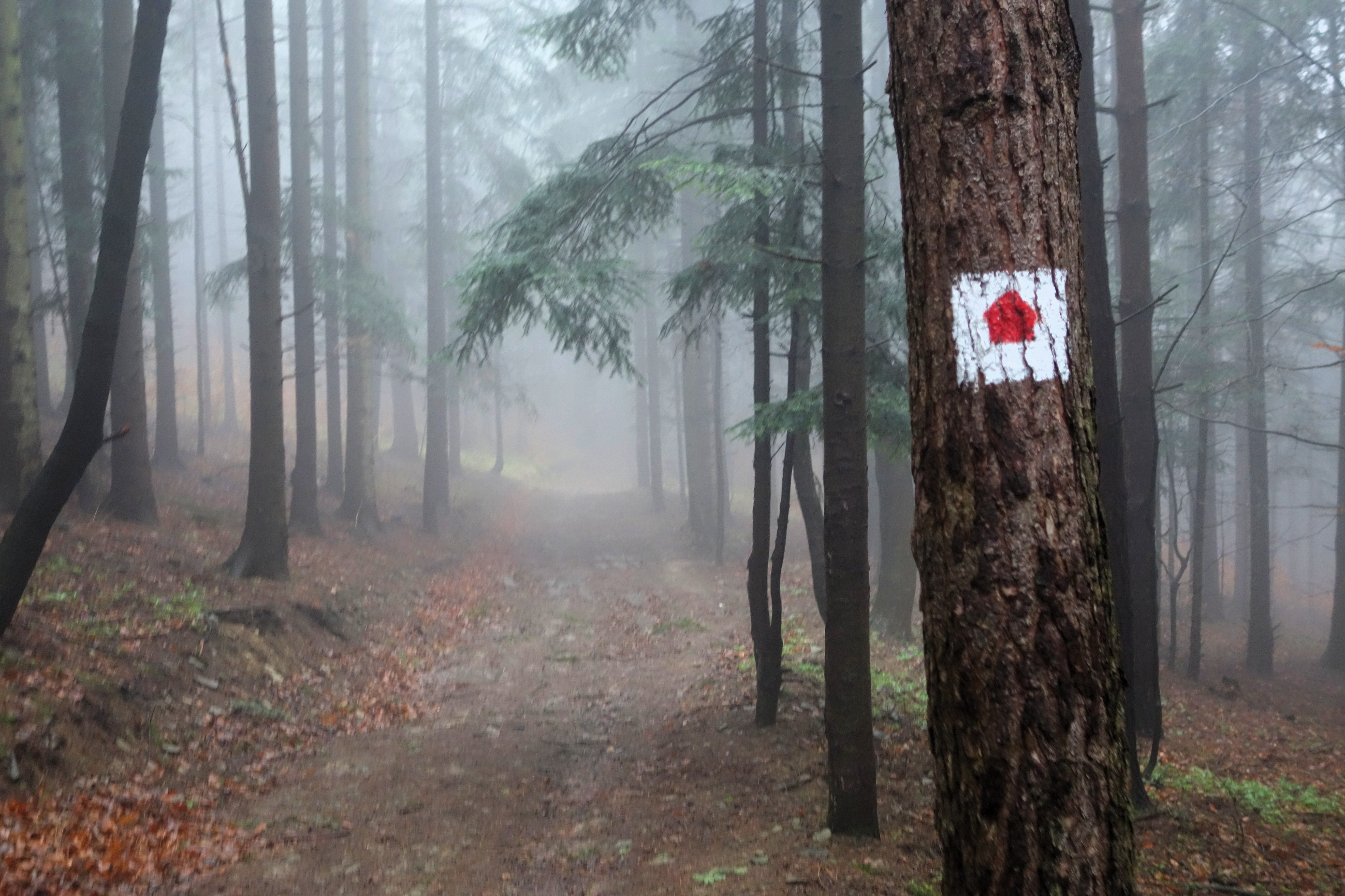 Oznaczenie szlaku chatkowego prowadzącego do SST Pod Solniskiem.